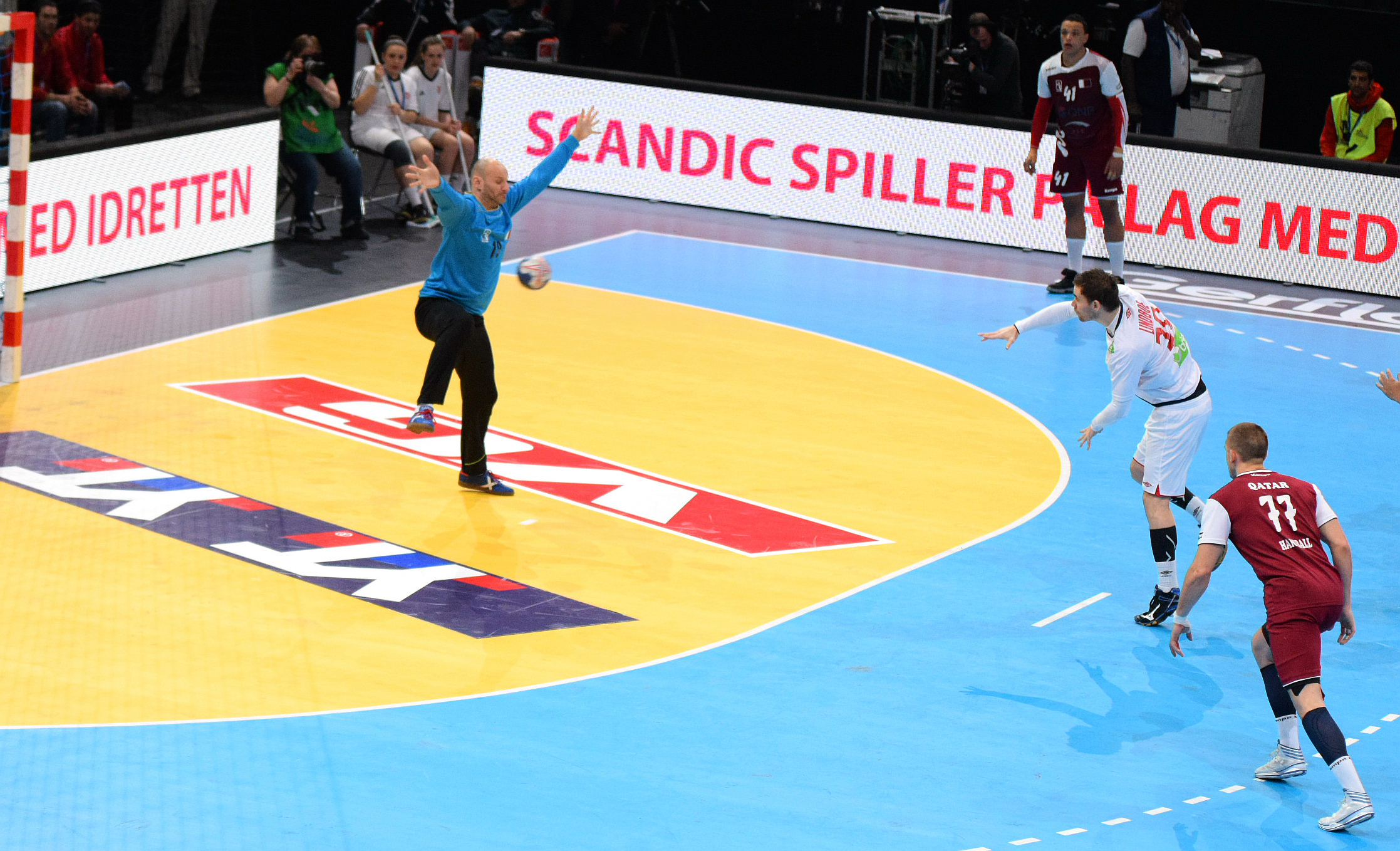 Danijel Saric et André Lindboe , le 10 janvier 2016 lors du match Norège / Qatar durant la Golden League à l'AccordHotel Arena (Paris).